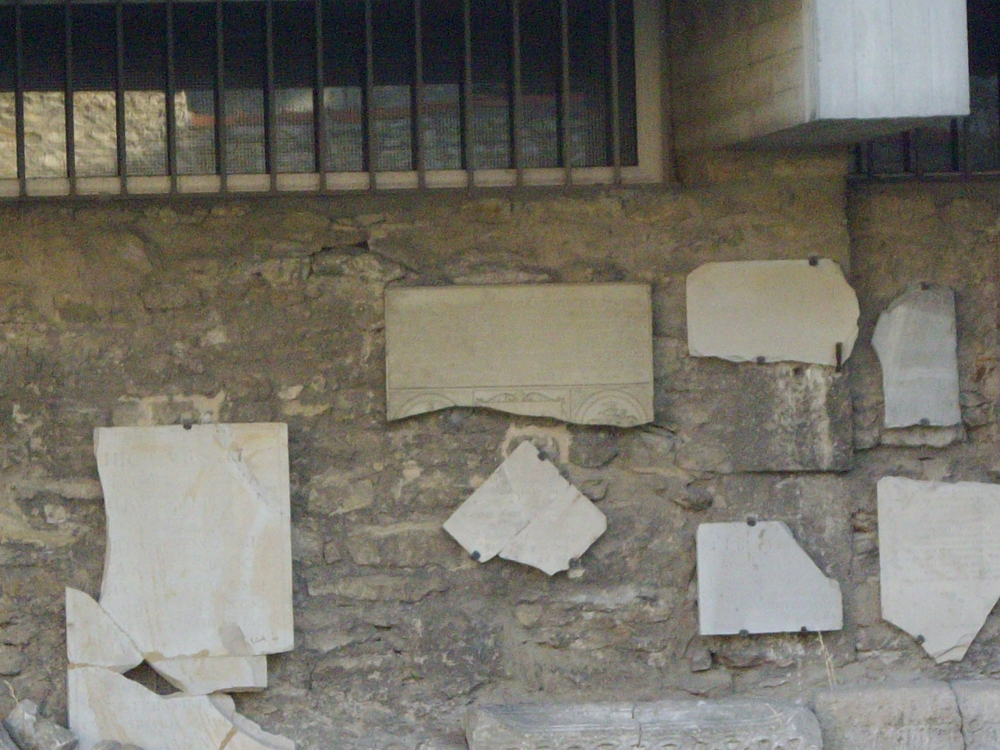 Überreste der Grabepitaphien der Damenstiftskirche Obermünster Regensburg an der Südwand der Stiftskirchenruine. In der oberen Bildhälfte befindet sich mittig die Grabplatte der Äbtissin Wandula von Schaumberg